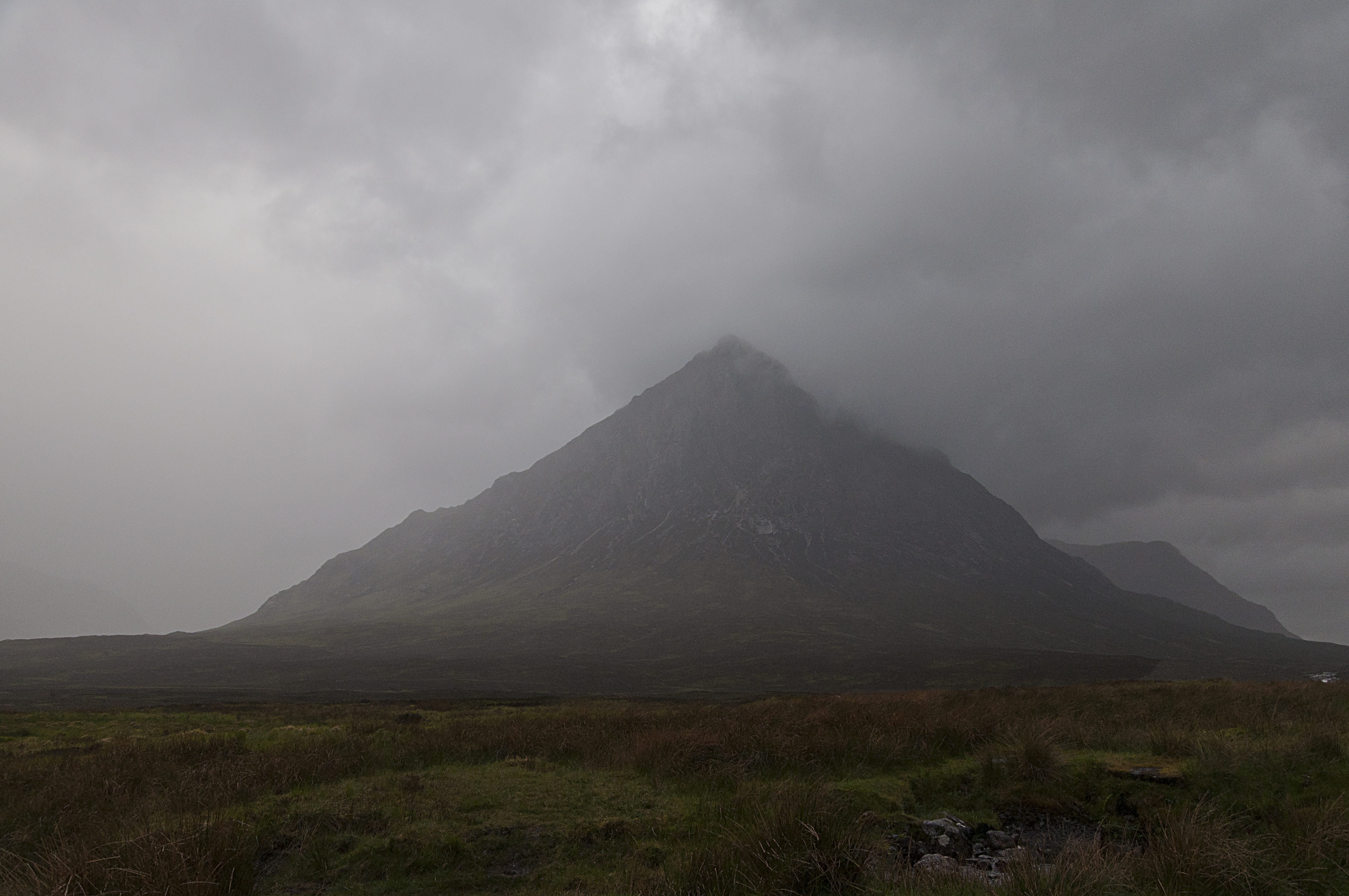 Buachaille Etive Mòr in Glen Coe, Schotland